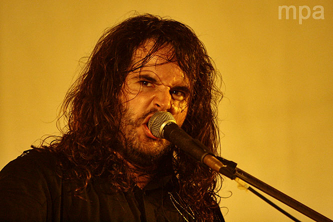 Gorka Elso (Vigo 2010)